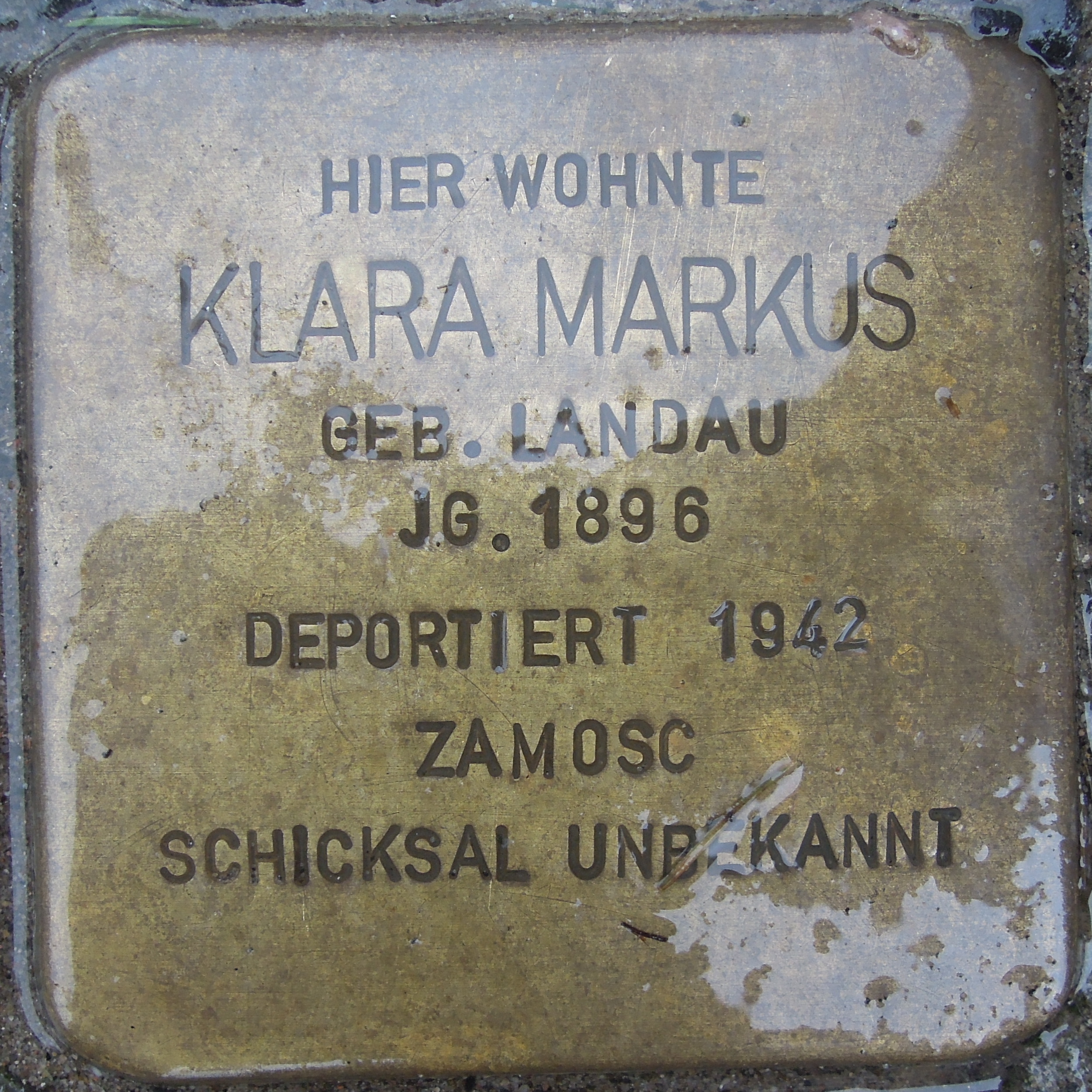 Stolperstein Hattingen Bahnhofstraße 6 für Klara Markus